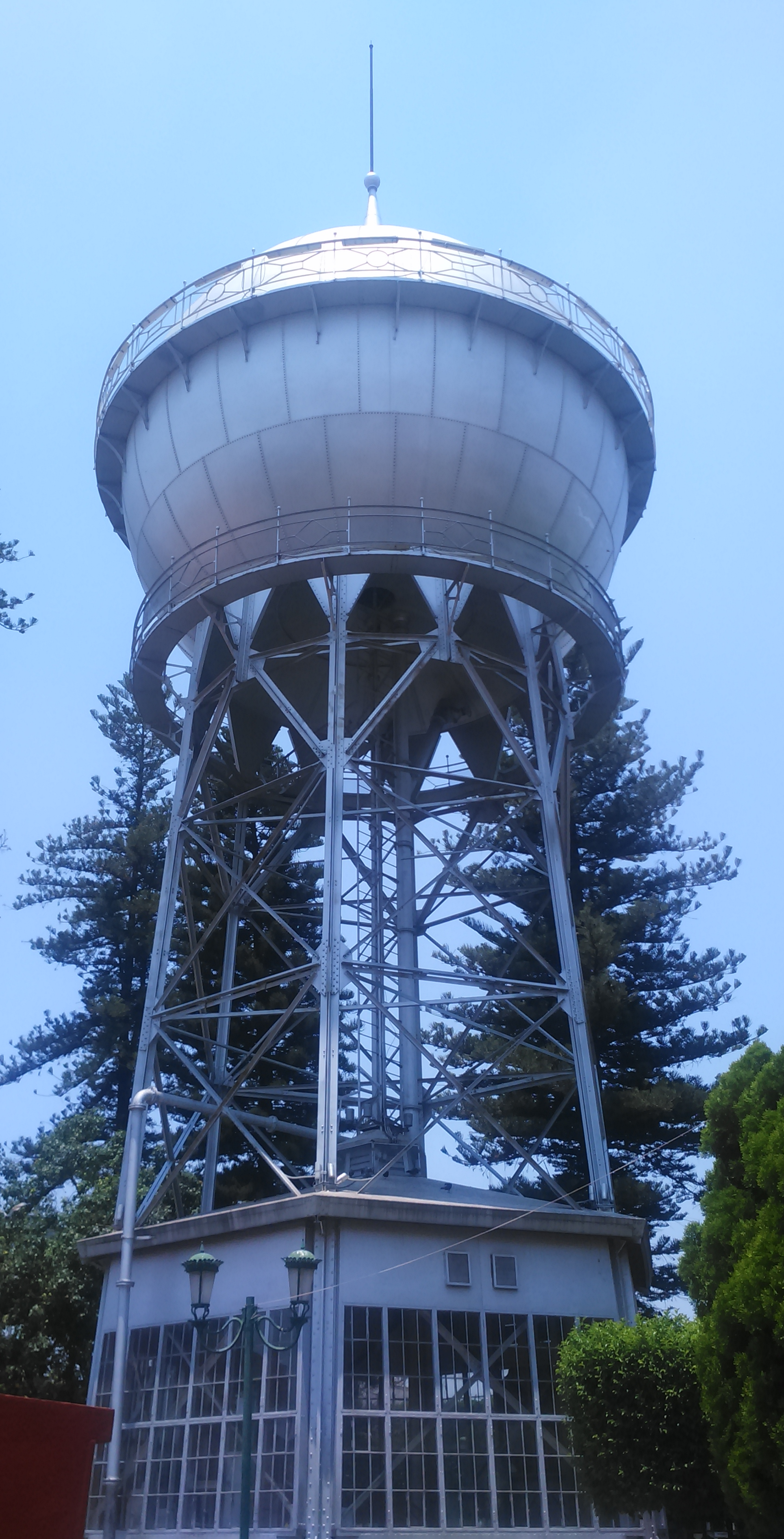 Torre hidráulica, popularmente conocida como Bola del agua; máximo símbolo de la ciudad